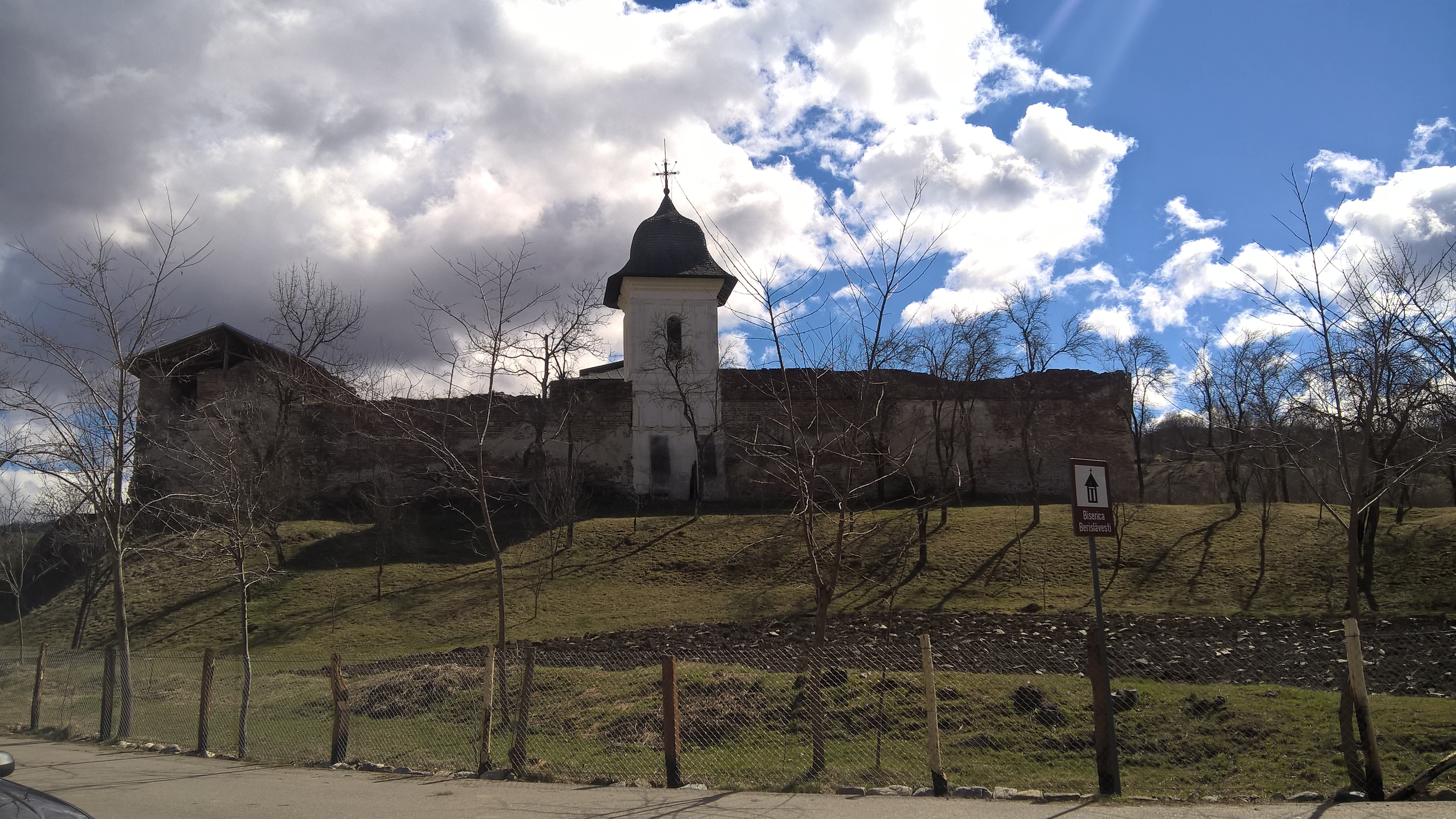 Fosta mănăstire Berislăvești, Biserica „Sf. Trei Ierarhi”, „Sf. Gheorghe” 01